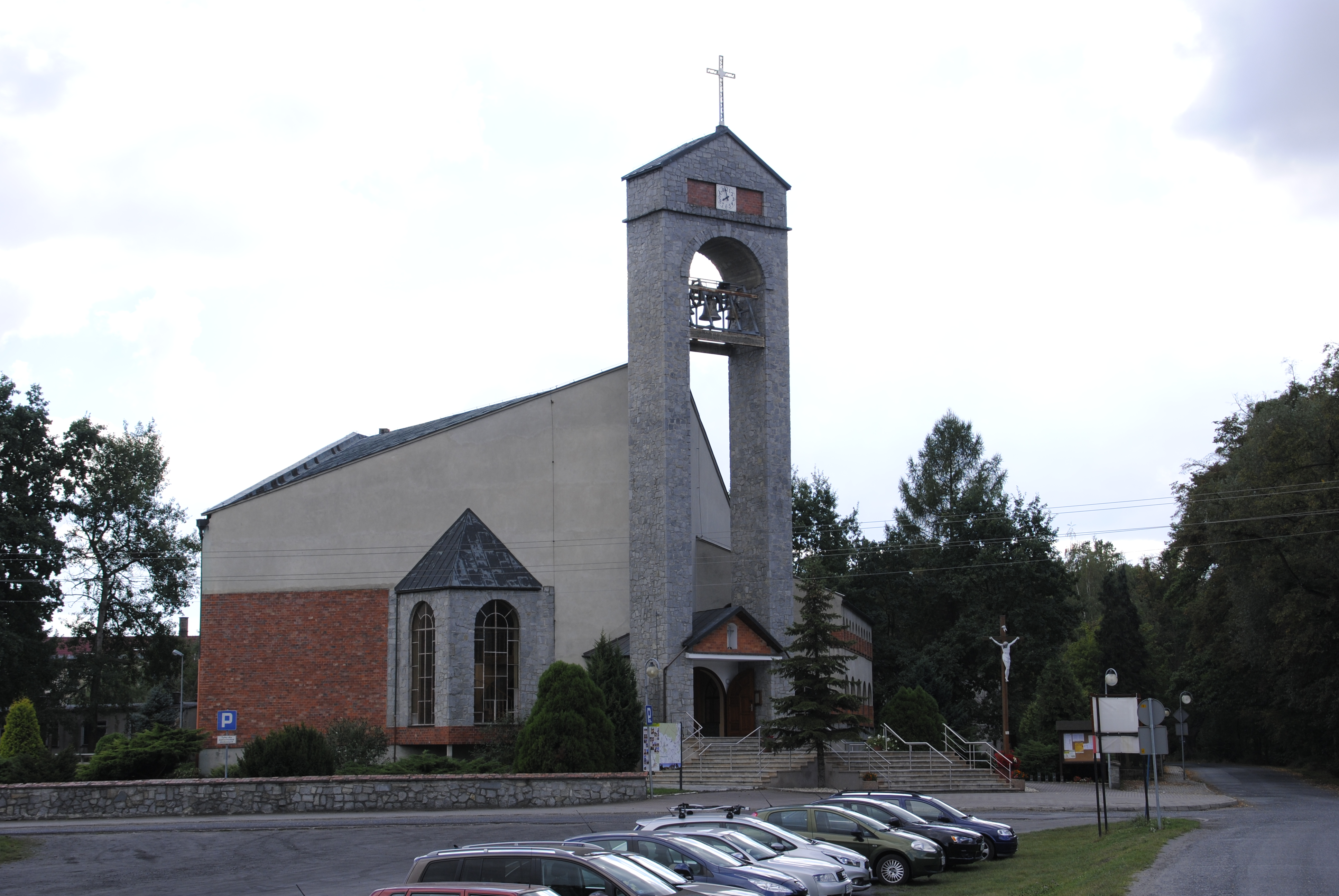 Moszna - rzymskokatolicki kościół filialny pw. Niepokalanego Serca Maryi, 1983-1999